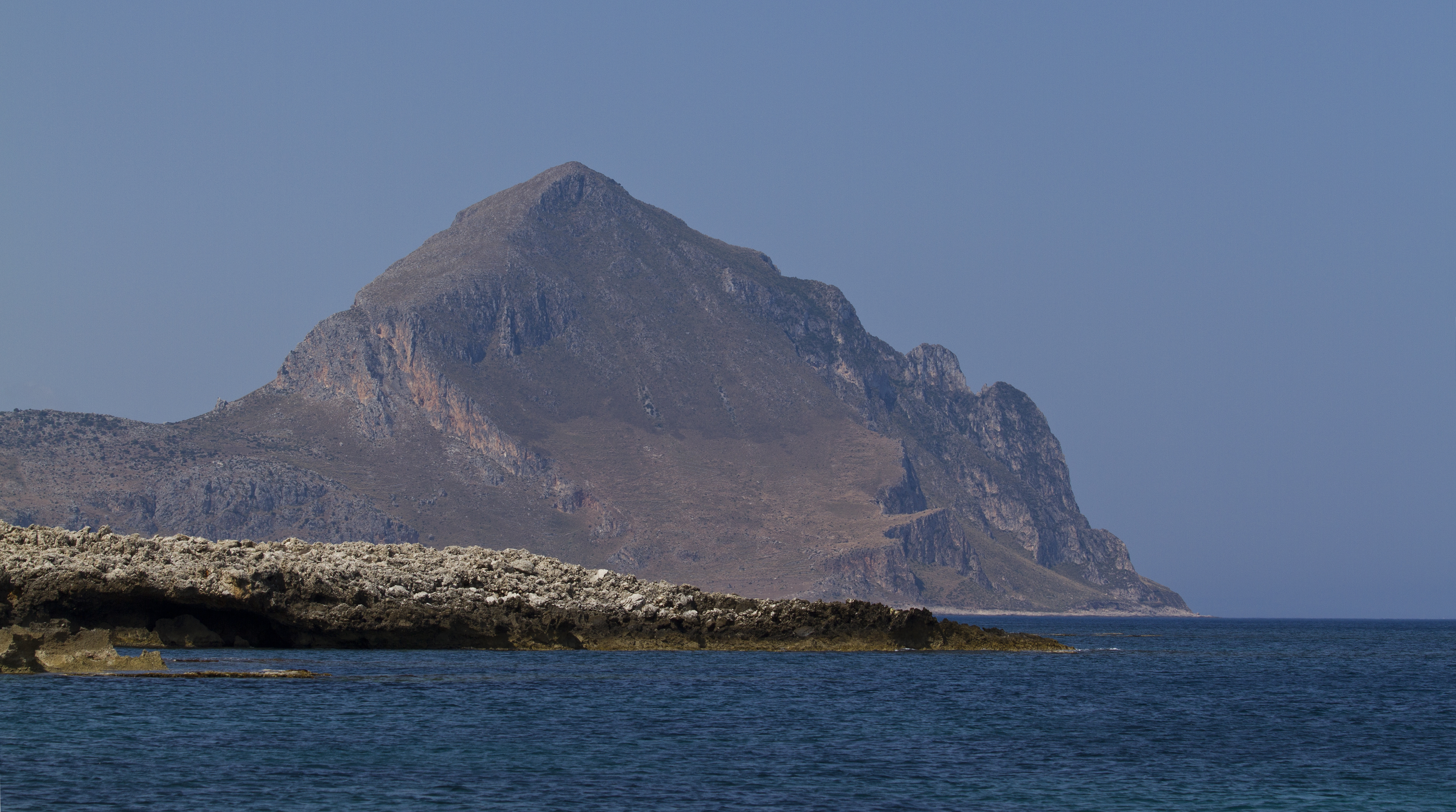 Riserva Naturale Orientata Monte Cofano, Trapani, Sicily, Italy